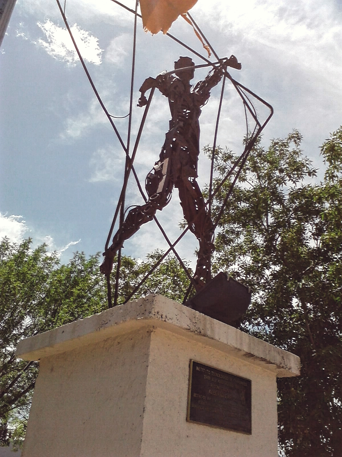 Escultura representativa del Instituto Tecnológico de Chihuahua